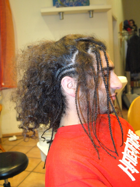 Die ersten Rastas sind geflochten. Im Ohrbereich wurden Cornrows geflochten.